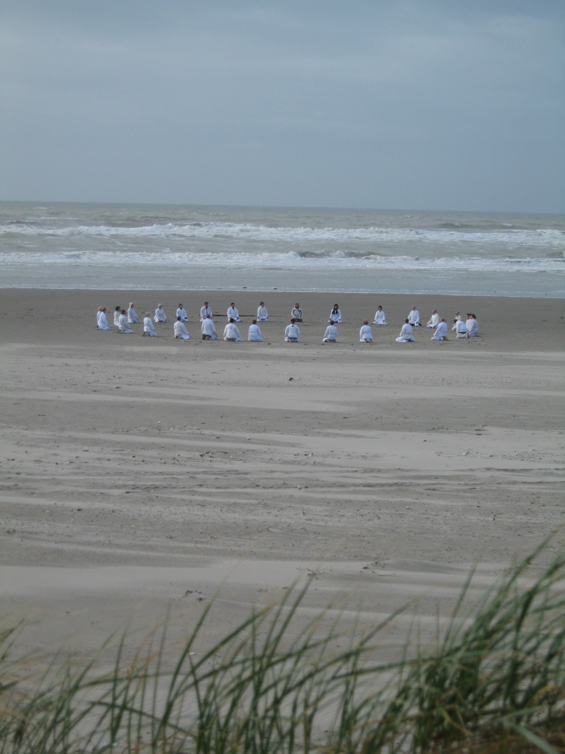 Shintaido France Kangeiko Seiza